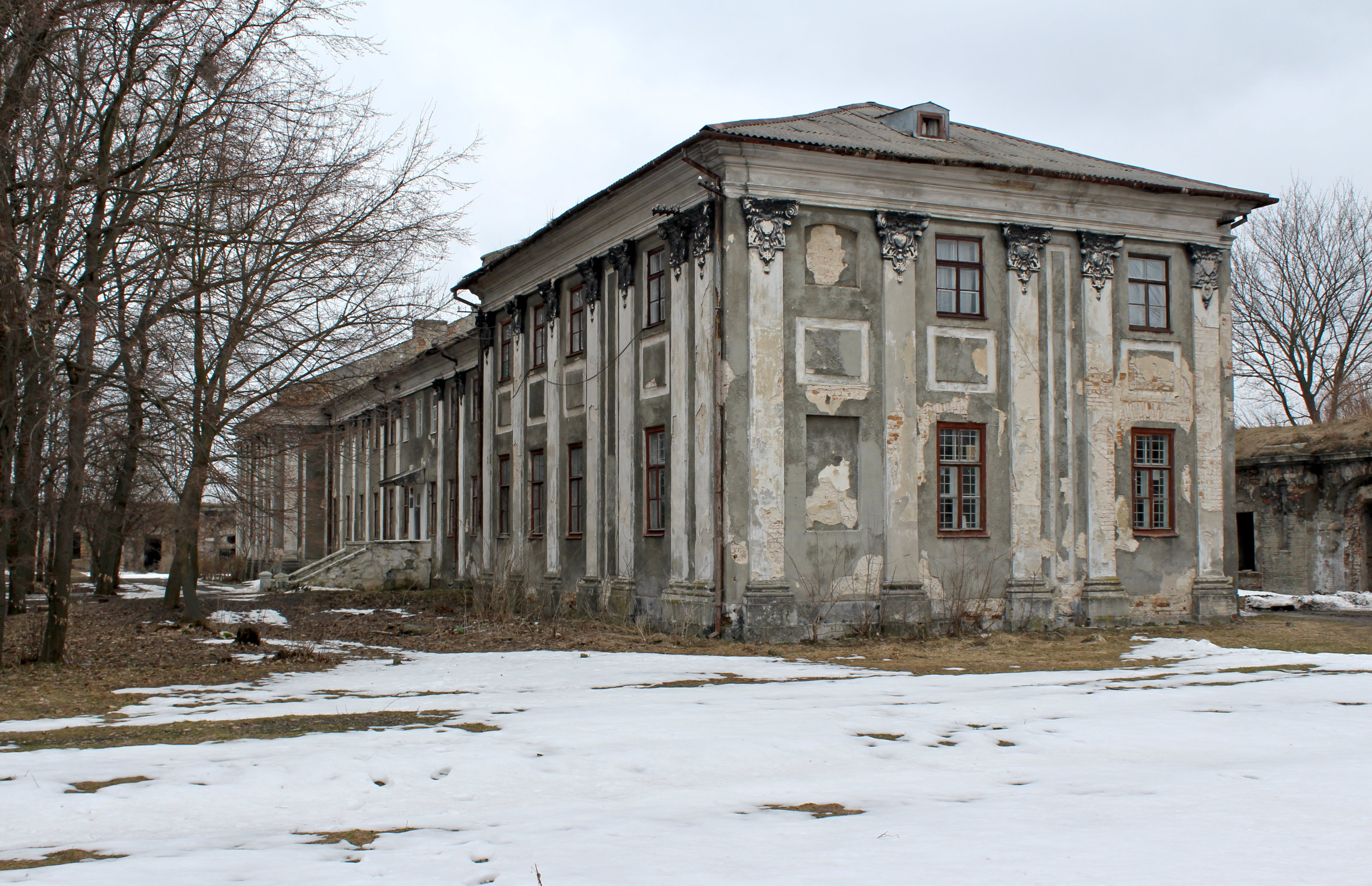 Das Schloss in der Zitadelle von Brody